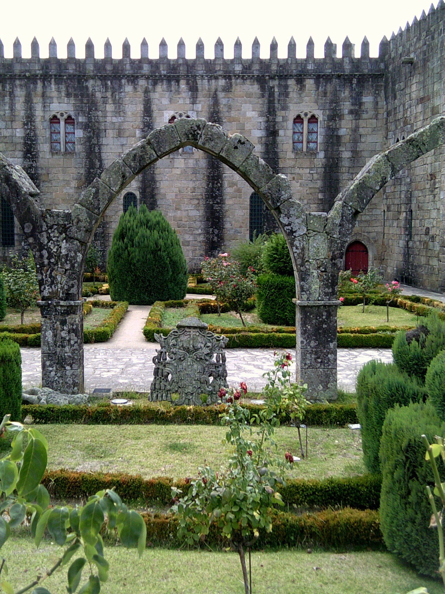 Jardim de Santa Bárbara, freguesia da Sé, centro histórico da cidade de Braga, distrito de Braga, Portugal: aspecto do Paço Episcopal.